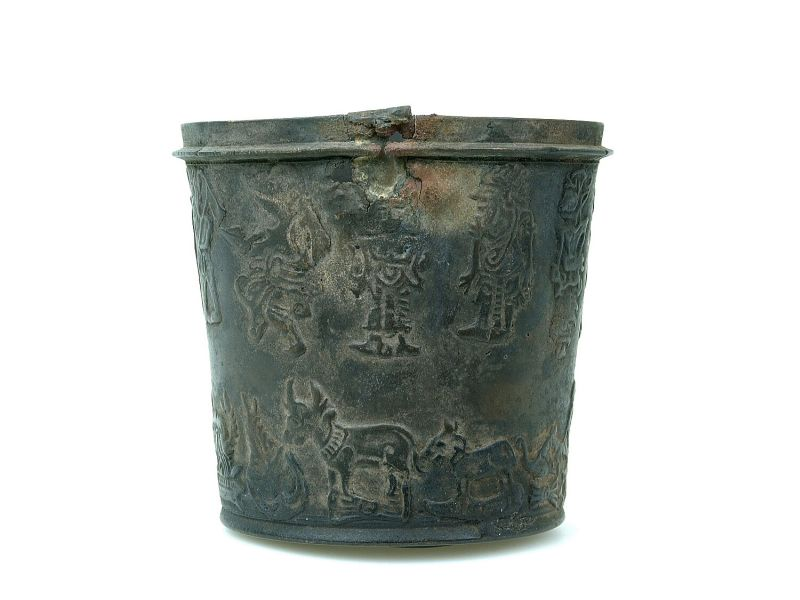 Beker. Zodiakbeker uit de Oost-Javaanse periode. Door Charles Sayers aangetroffen op Bali ?. Zodiakbeker Unknown language: Sangku